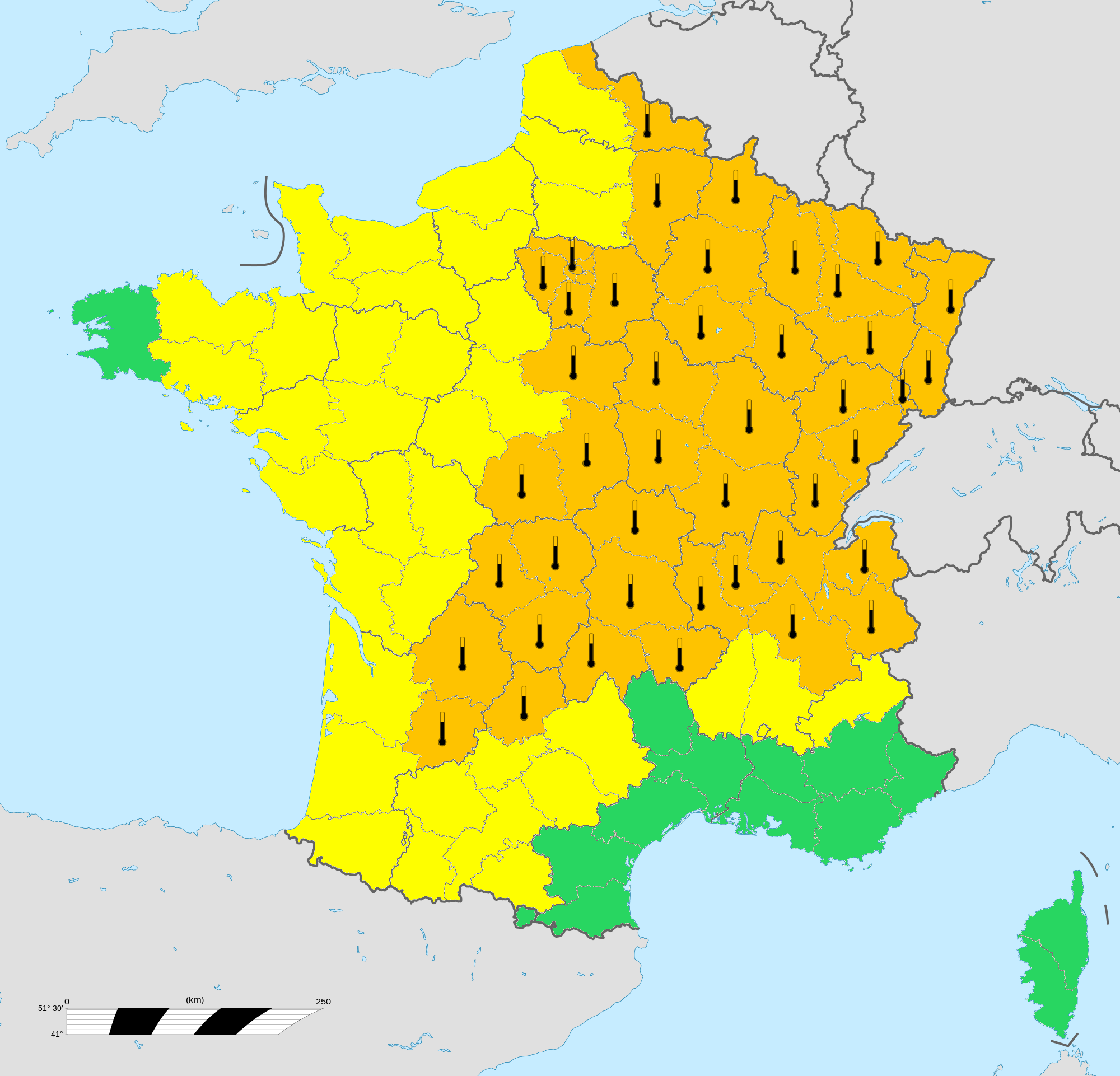 Vigilance météorologique MétéoFrance du 1er juillet 2015 à 16h00. Alerte canicule : 47 départements en vigilance orange canicule.